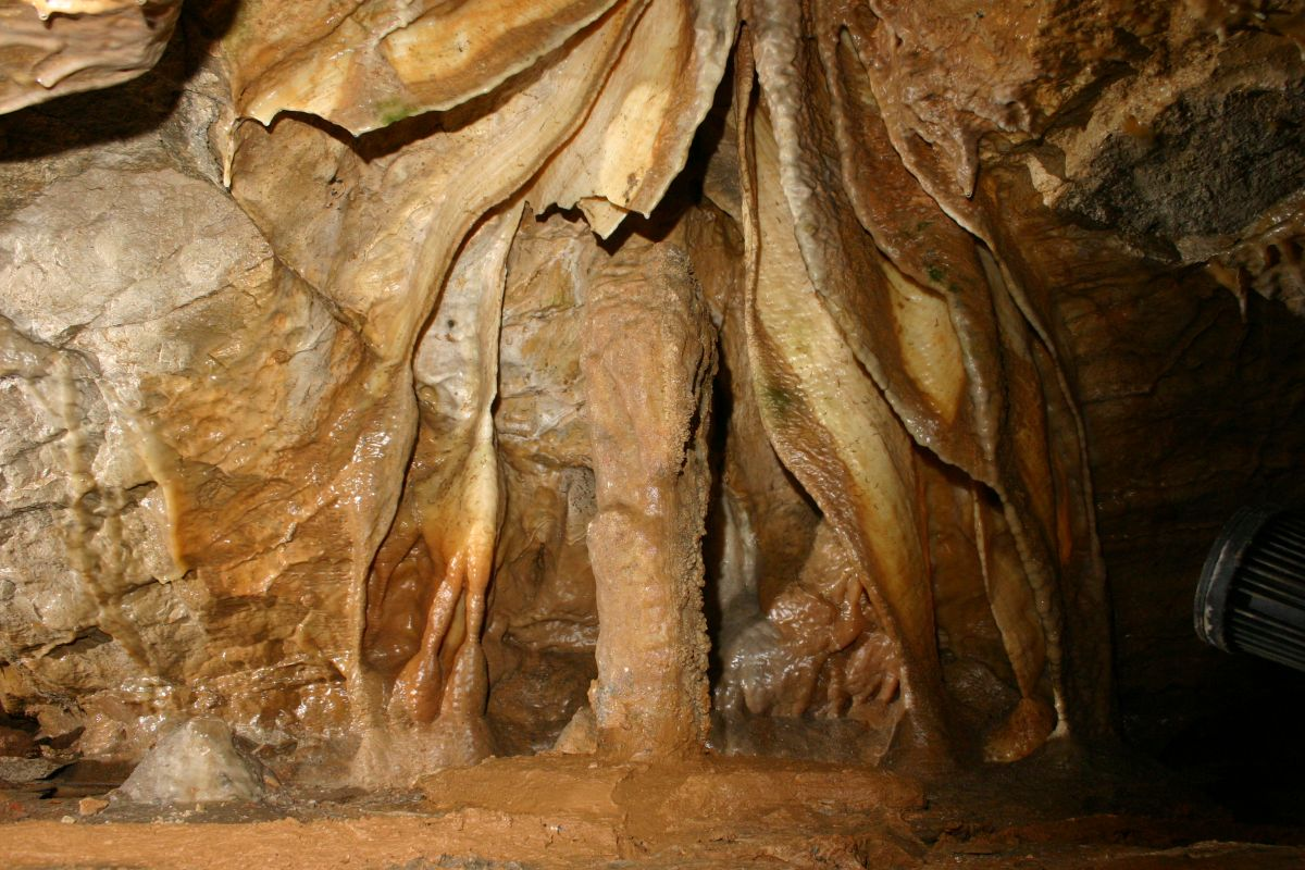 Binghöhle bei Streitberg